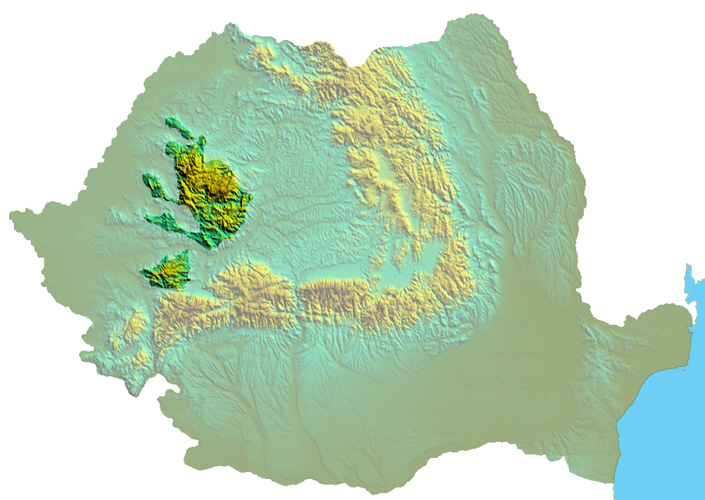 Carpaţii Occidentali in Romania